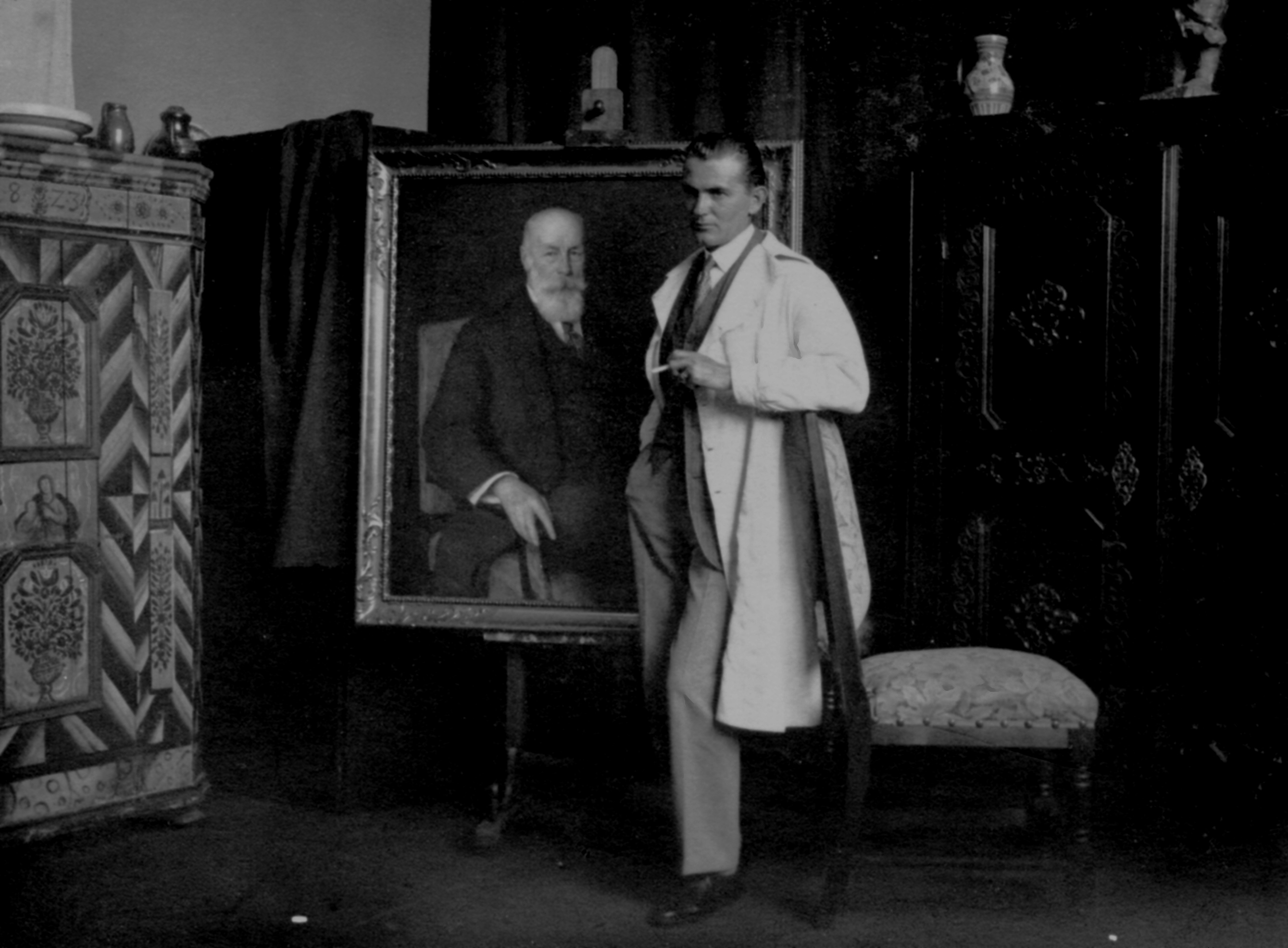 Foto aus Privatbesitz. Das gleiche Foto erschien 1928 auch in der New York Times.